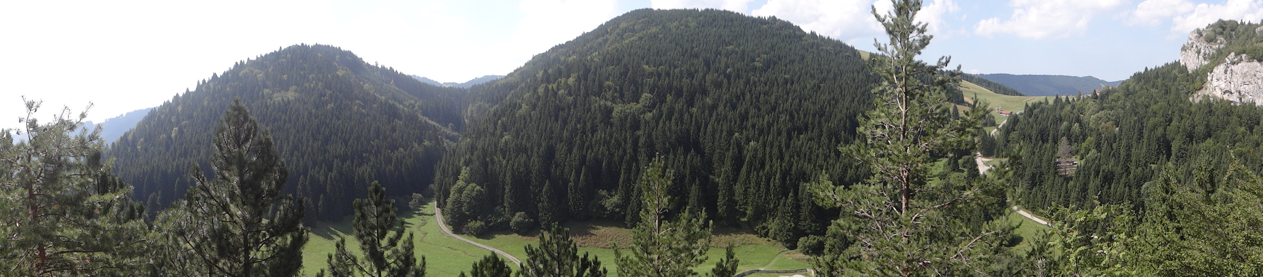 Borovnik, Malinné